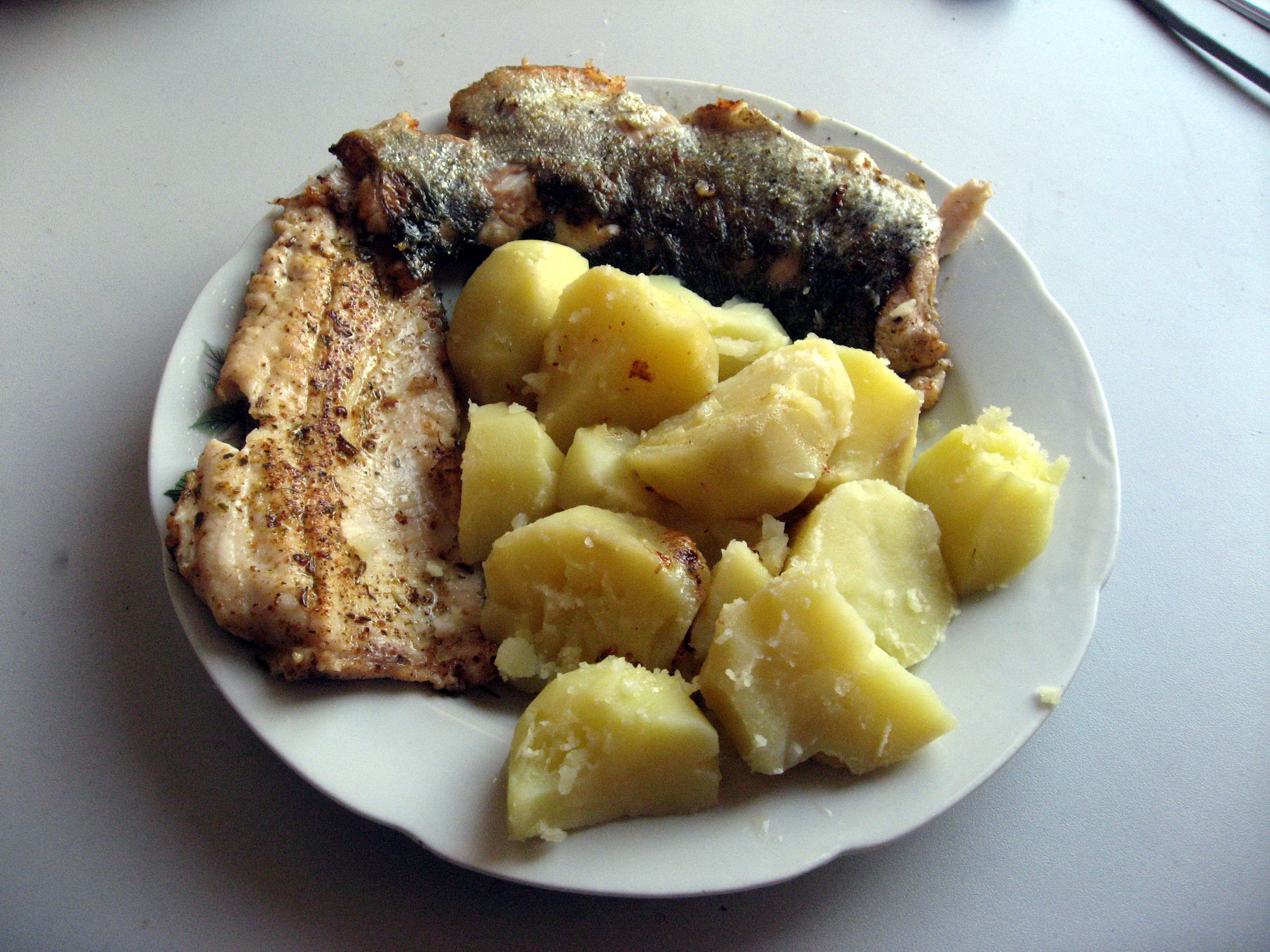 Pstruh duhový a vařené brambory